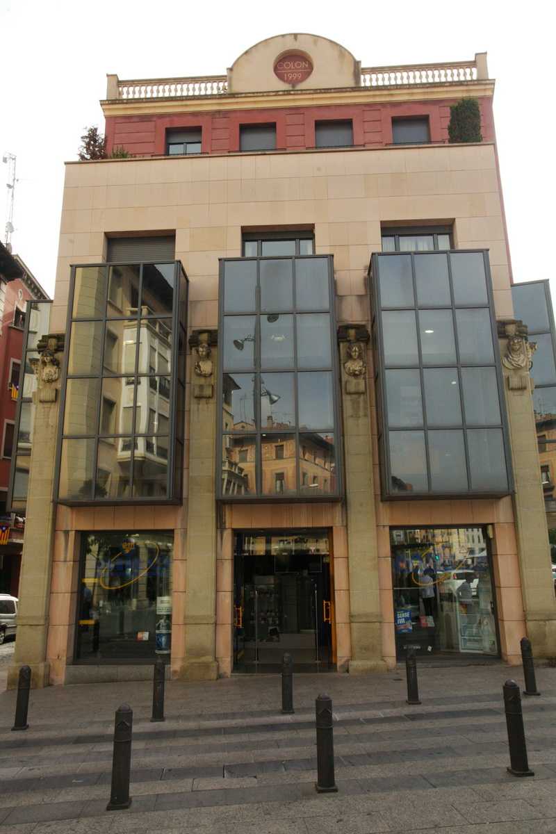 Hotel Colon (Vic)